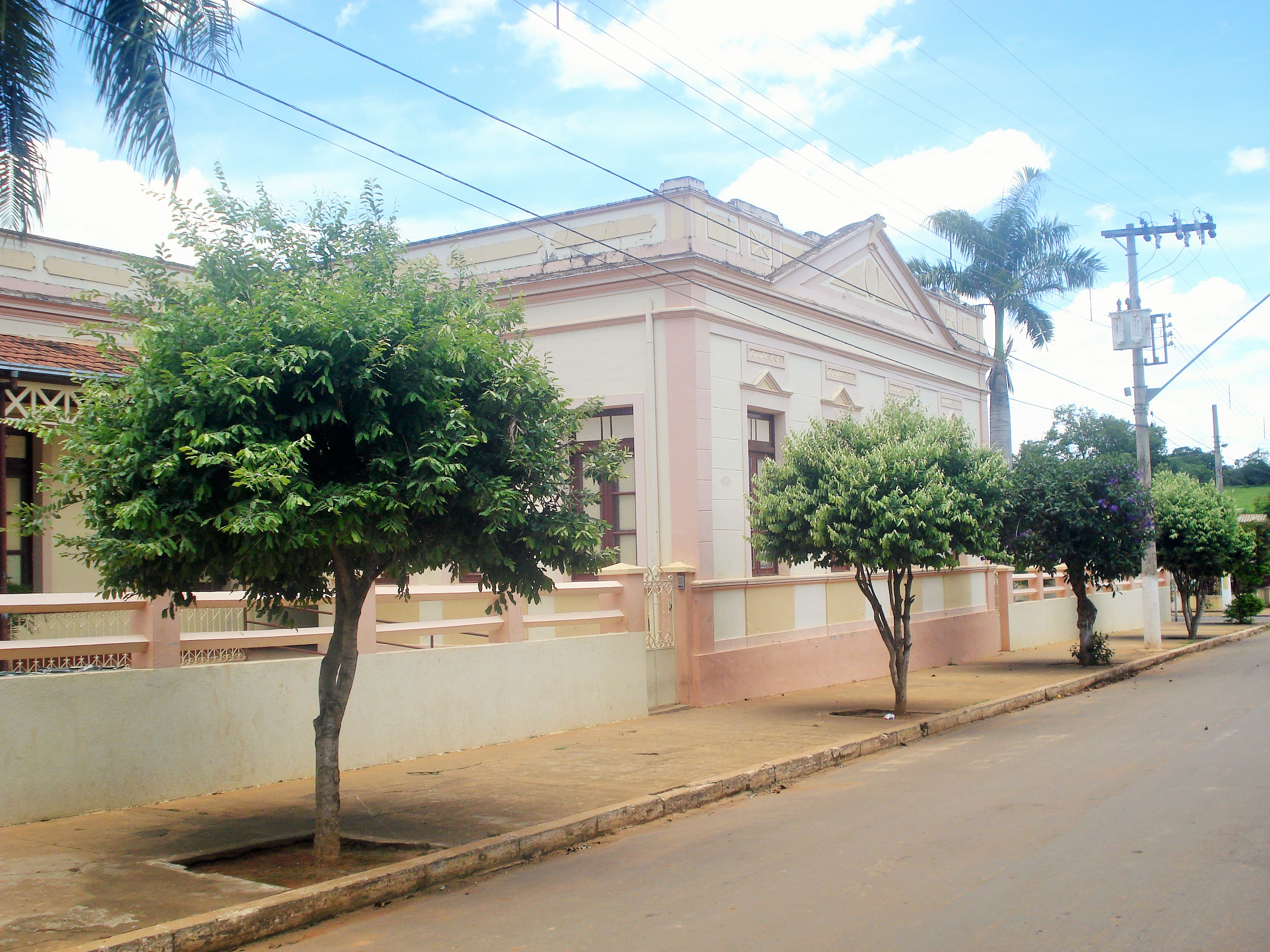 Escola Estadual Dr. Jacinto Campos, em Pompéu (MG). Localizada na praça da Igreja Matriz da cidade. Escola mais antiga da cidade.